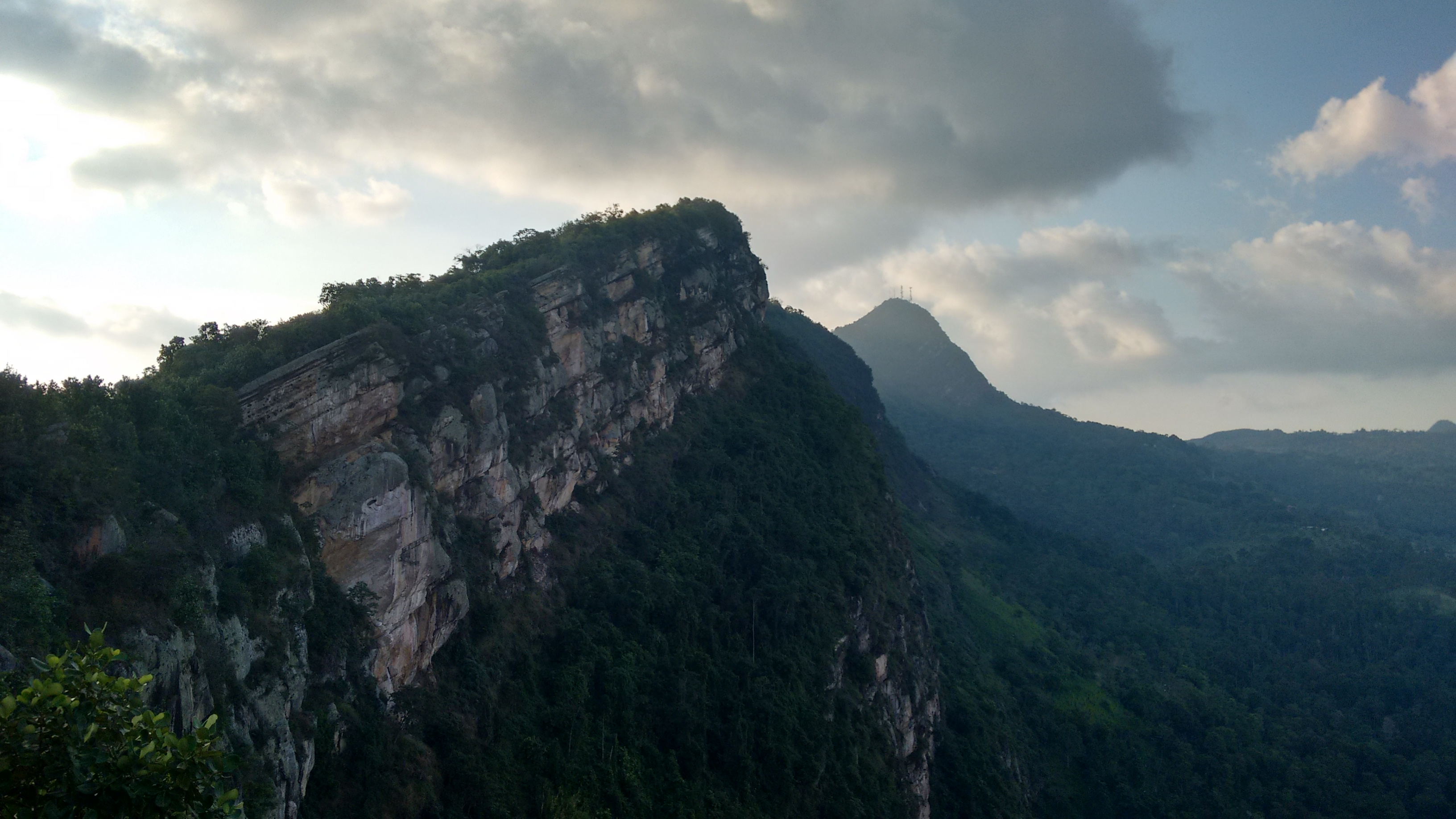 Antiguo asentamiento Panche